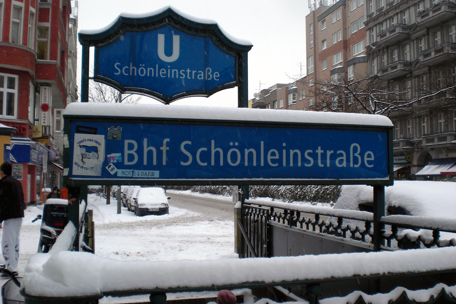 Eingang des U-Bahnhofs Schönleinstraße